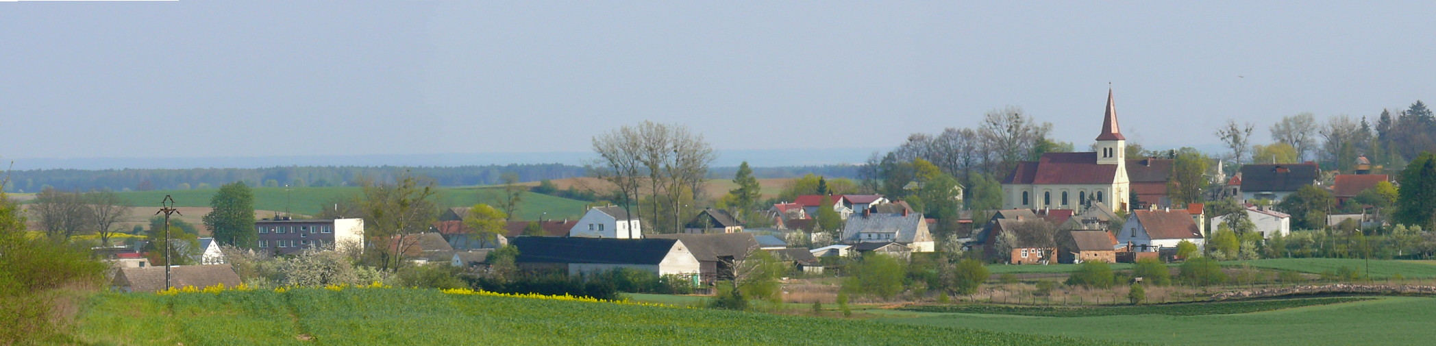 Róża Wielka - panorama wsi z rzymskokatolickim kościołem parafialnym p.w. Świętej Trójcy, 1830-1832